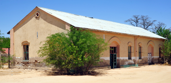 ehemalige Wagenbauerei Eduard Hälbich in Otjimbingwe, Namibia 2012